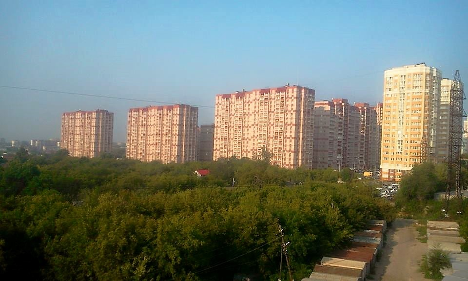 Сфотографировал ближайшие дома на улице Долотной на мобильный телефон из окна своего дома. Изображены на фото новые дома которые построили в 2012 году и гаражи которые снесли в 2018 году.